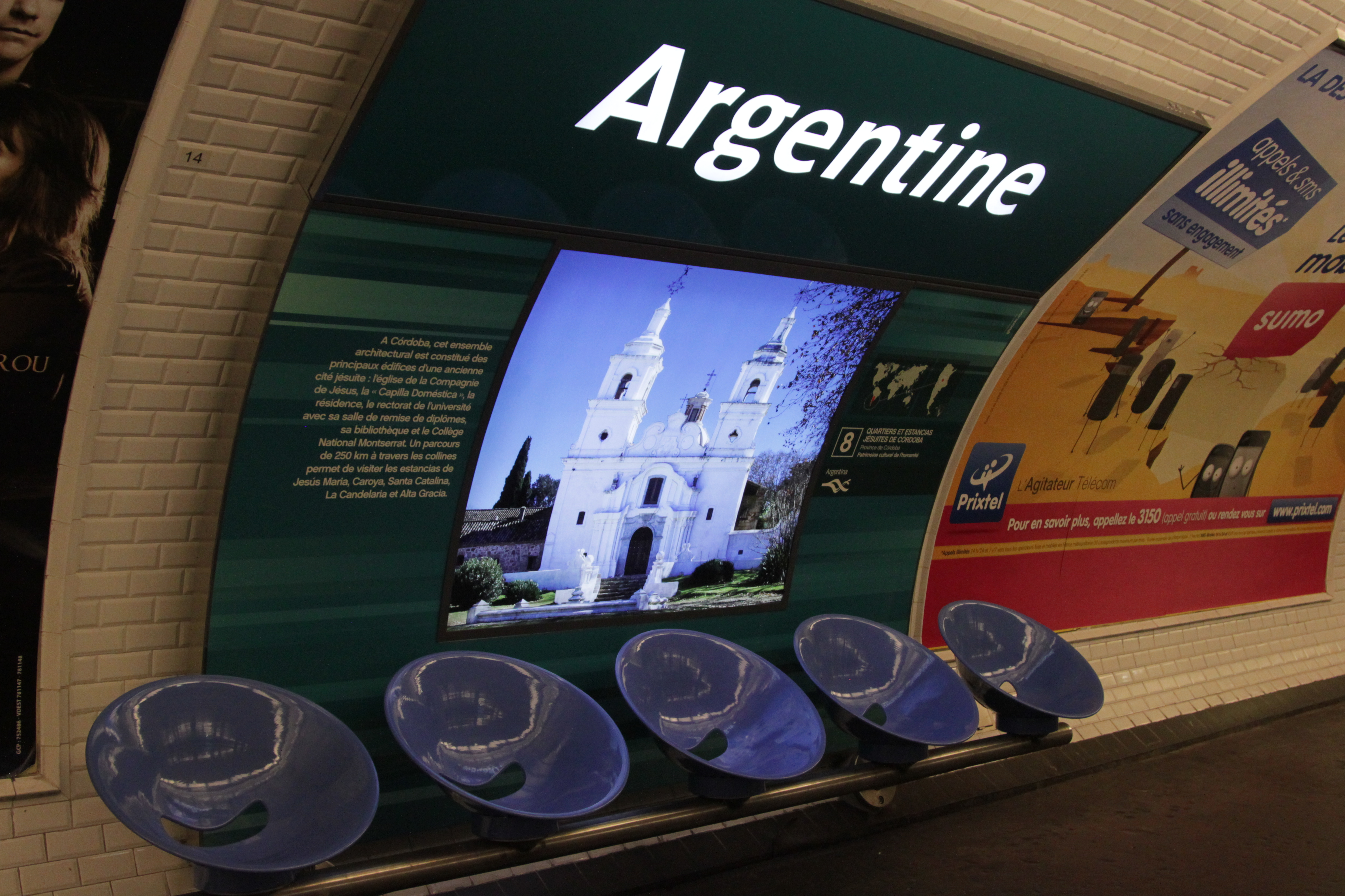 Station Argentine sur la ligne 1 du métro de Paris.